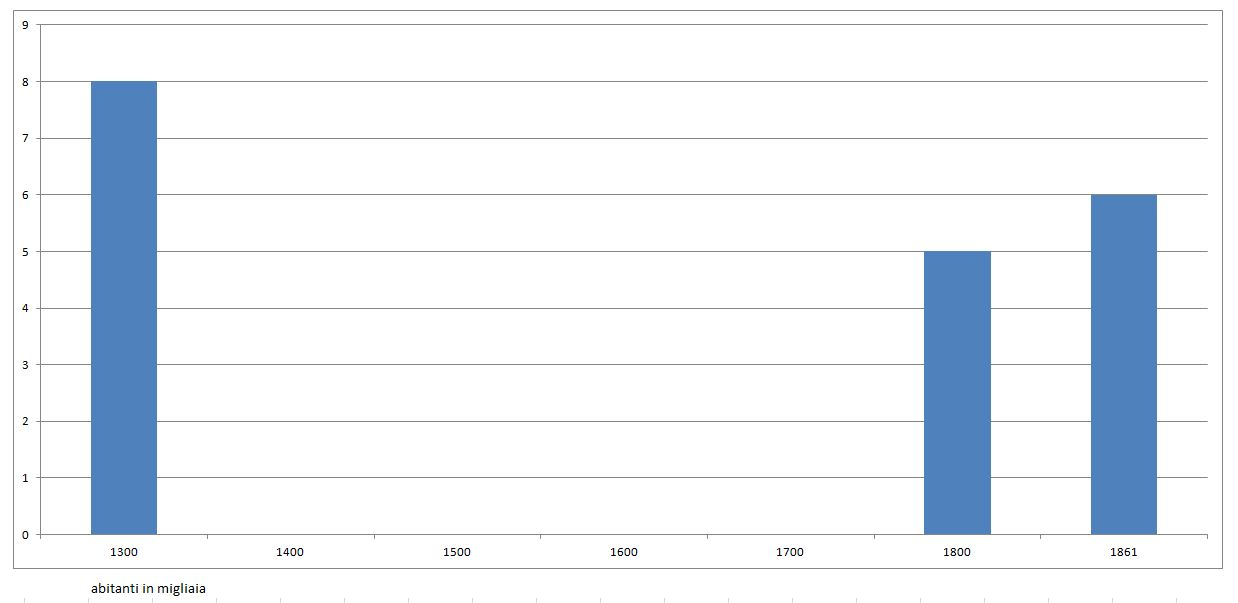 Abitanti Crotone dal 1300 al 1861